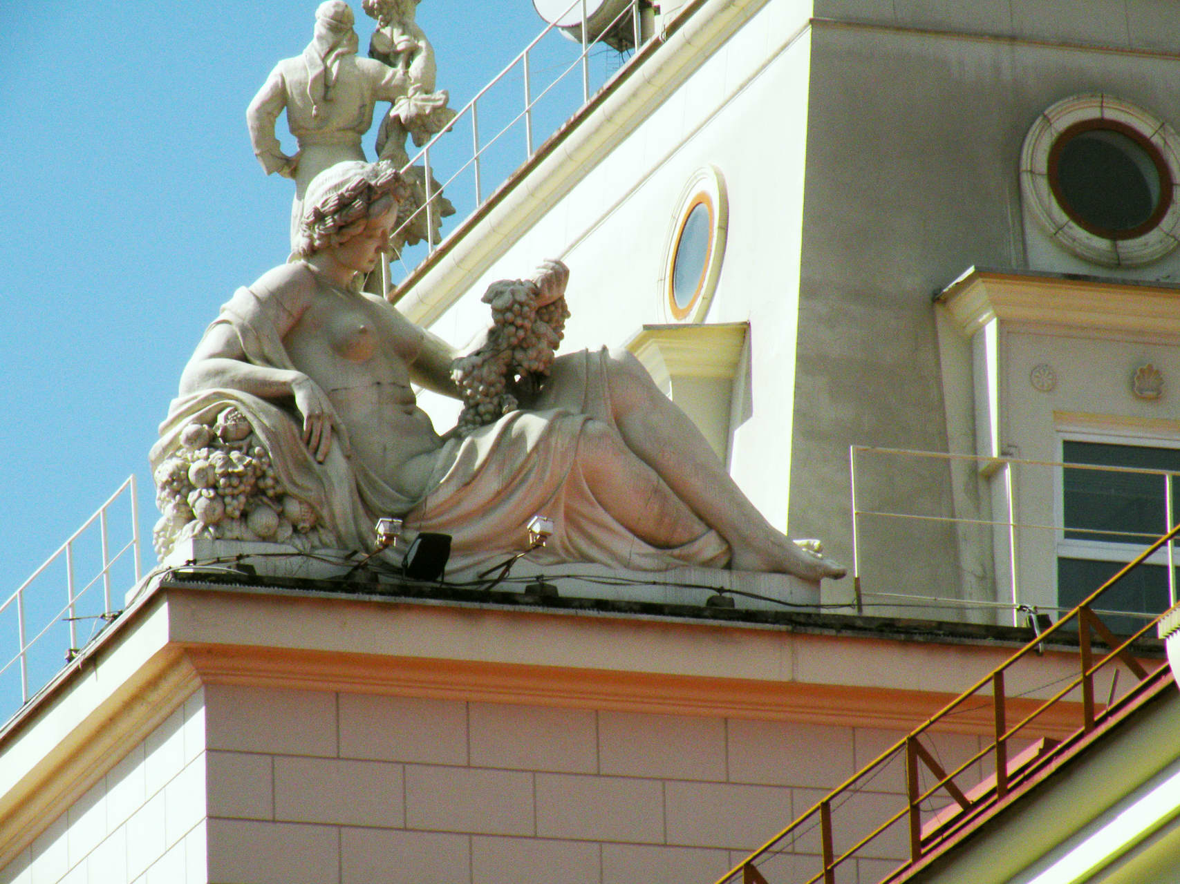 Здание морвокзала (Краснодарский край, Сочи, войкова улица, 1)